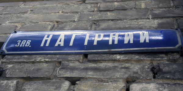 табличка Нагірного провулку на Татарці